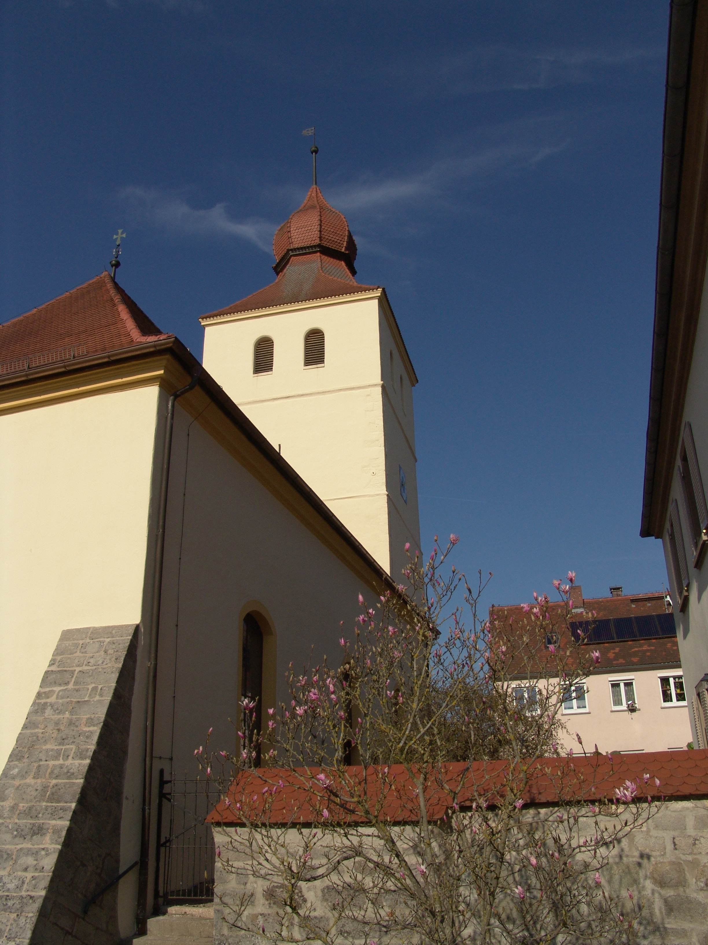 Evangelische Kirche